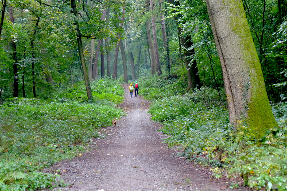 "Тропа Клинка" - туристский маркированнный маршрут вокруг немецкого города Золинген (Северный Рейн-Вестфалия). Седьмой этап: окрестностями Лангенфельда. 8.4 км.